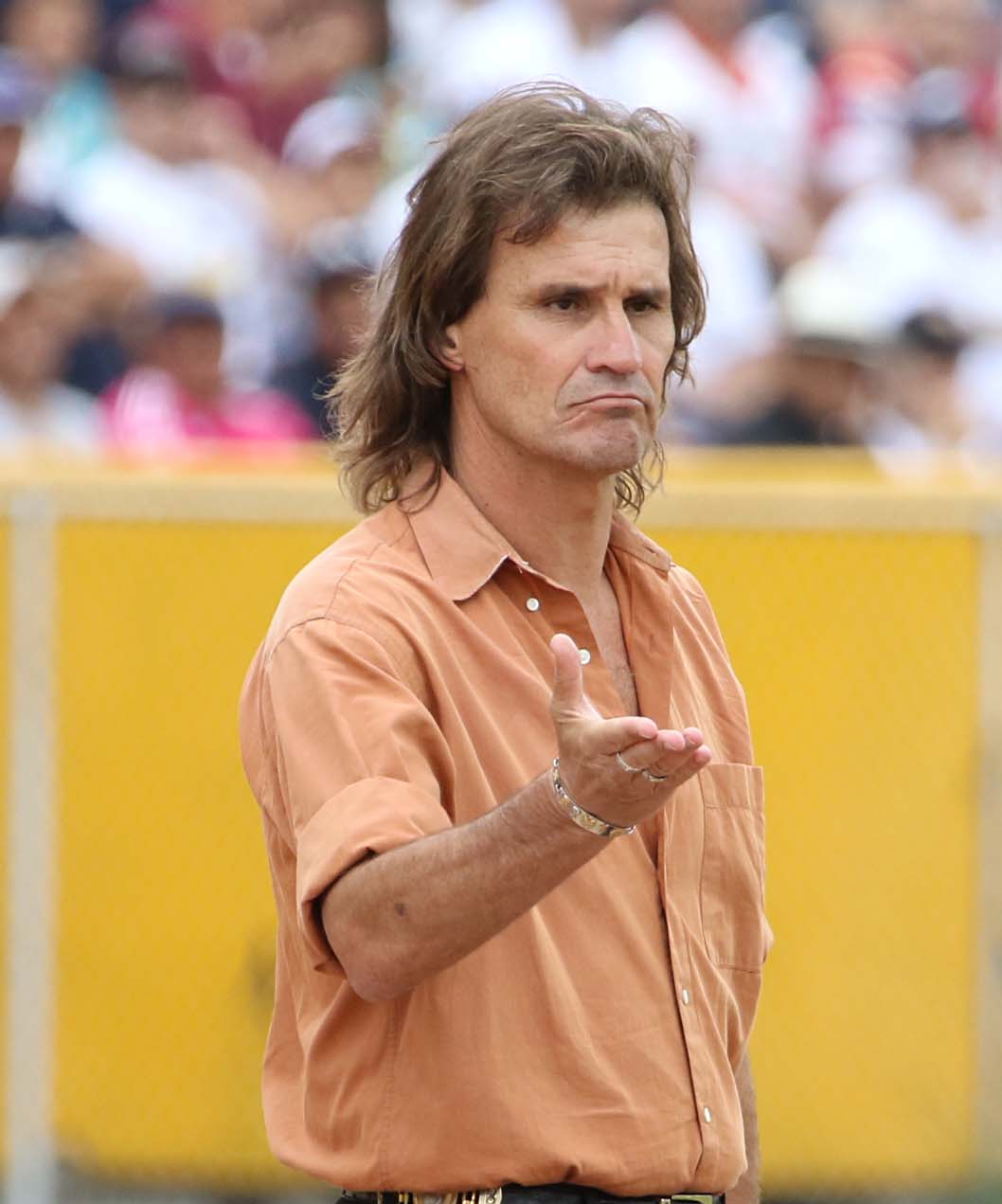 LDU-NACHO 11 MAV